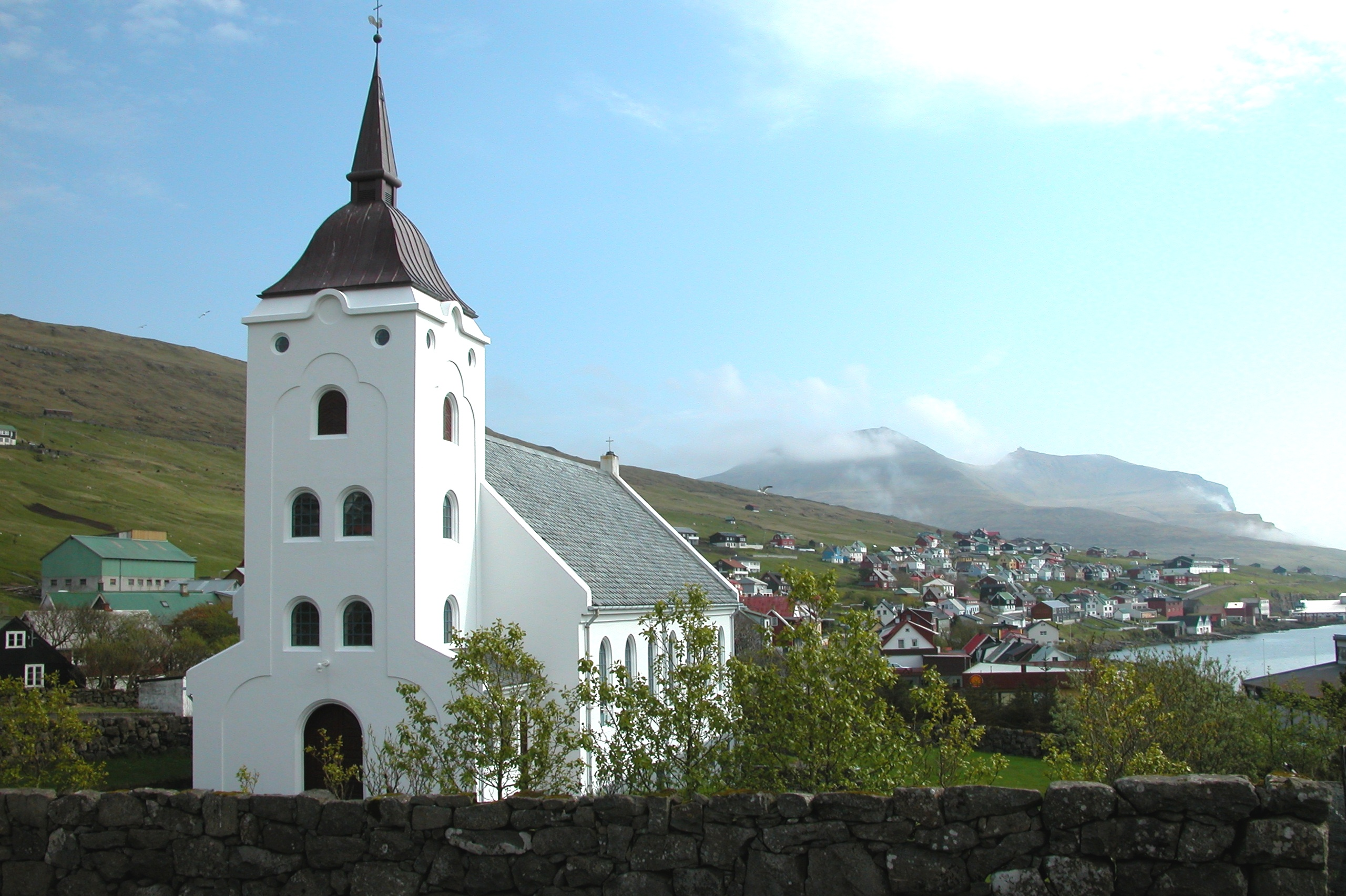 Miðvágur on Vágar, Faroe Islands.